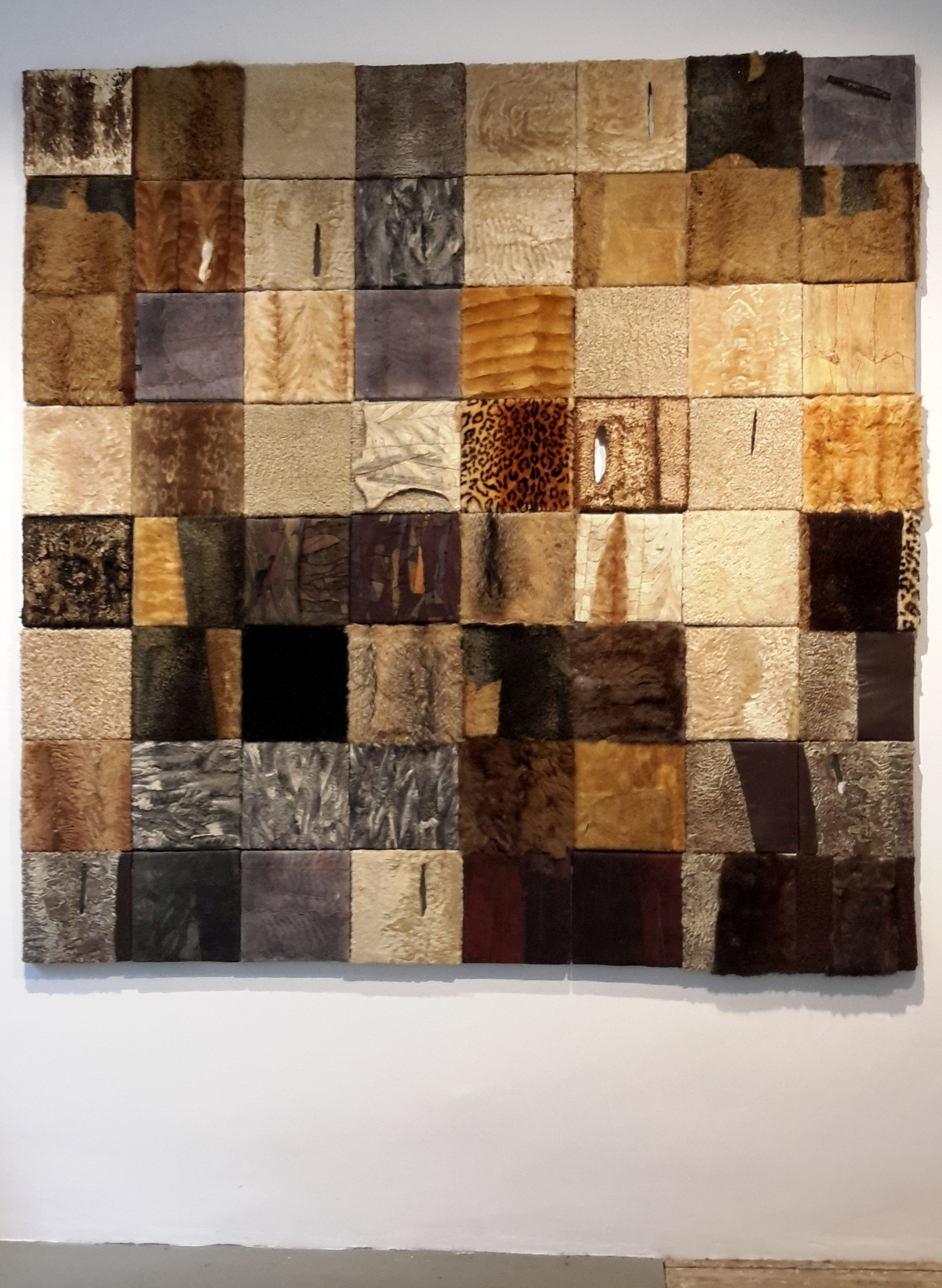 Cora Fisch, Berlin. Skulptur–Installation Quadratur des Pelzes. Galerie Z22 (White Cube), Berlin. Vernissage am 3. Mai 2018.